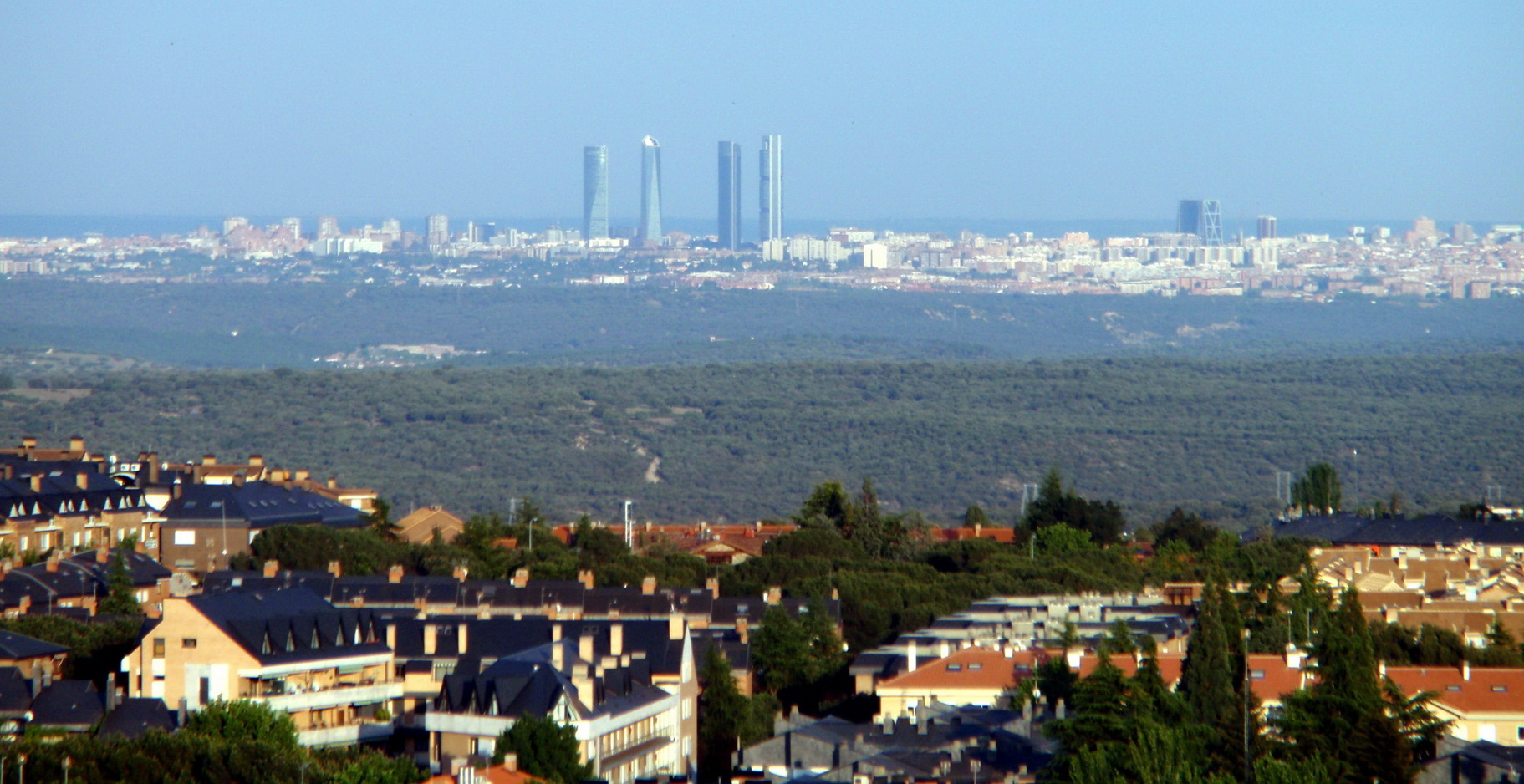 Torrelodones. Vista de Madrid desde el Polideportivo de Torrelodones.